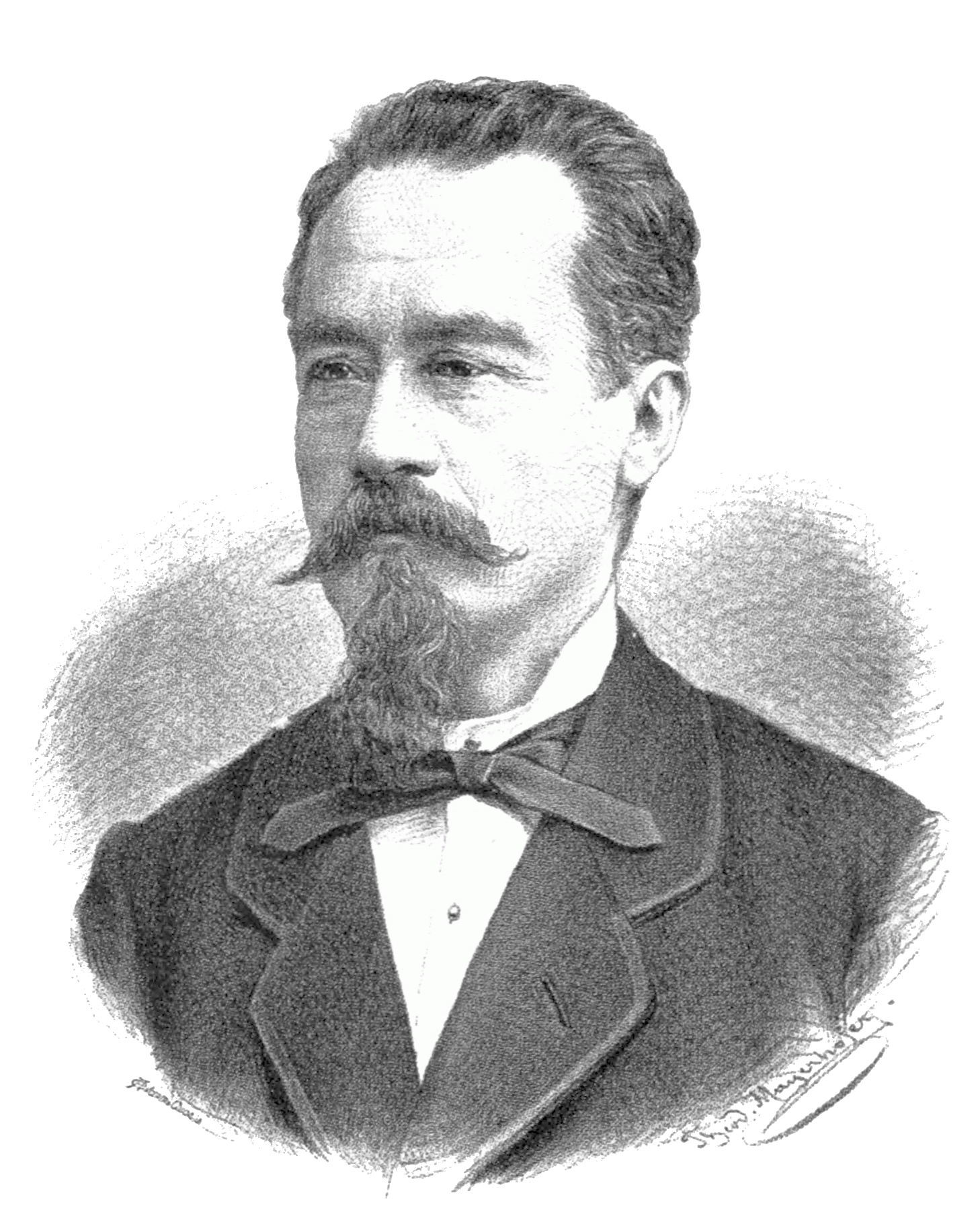 Dinko Vitezić (1822–1904), Croatian jurist and politician